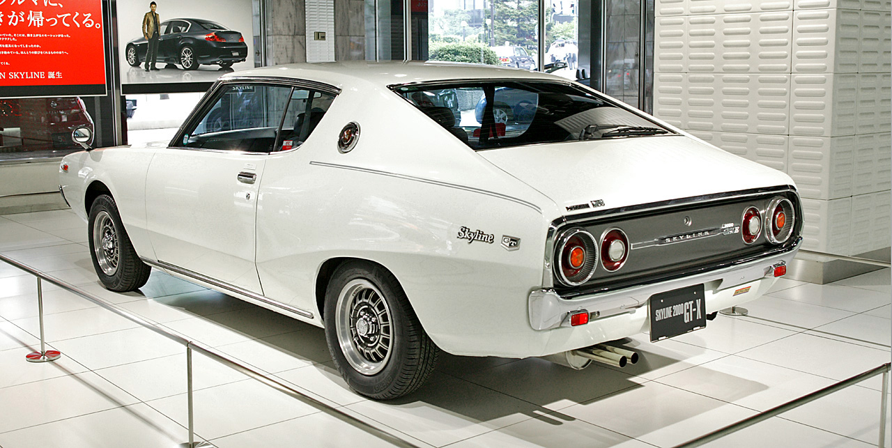 Nissan Skyline C110 Hardtop 2000 GTX-E ( KGC111 )